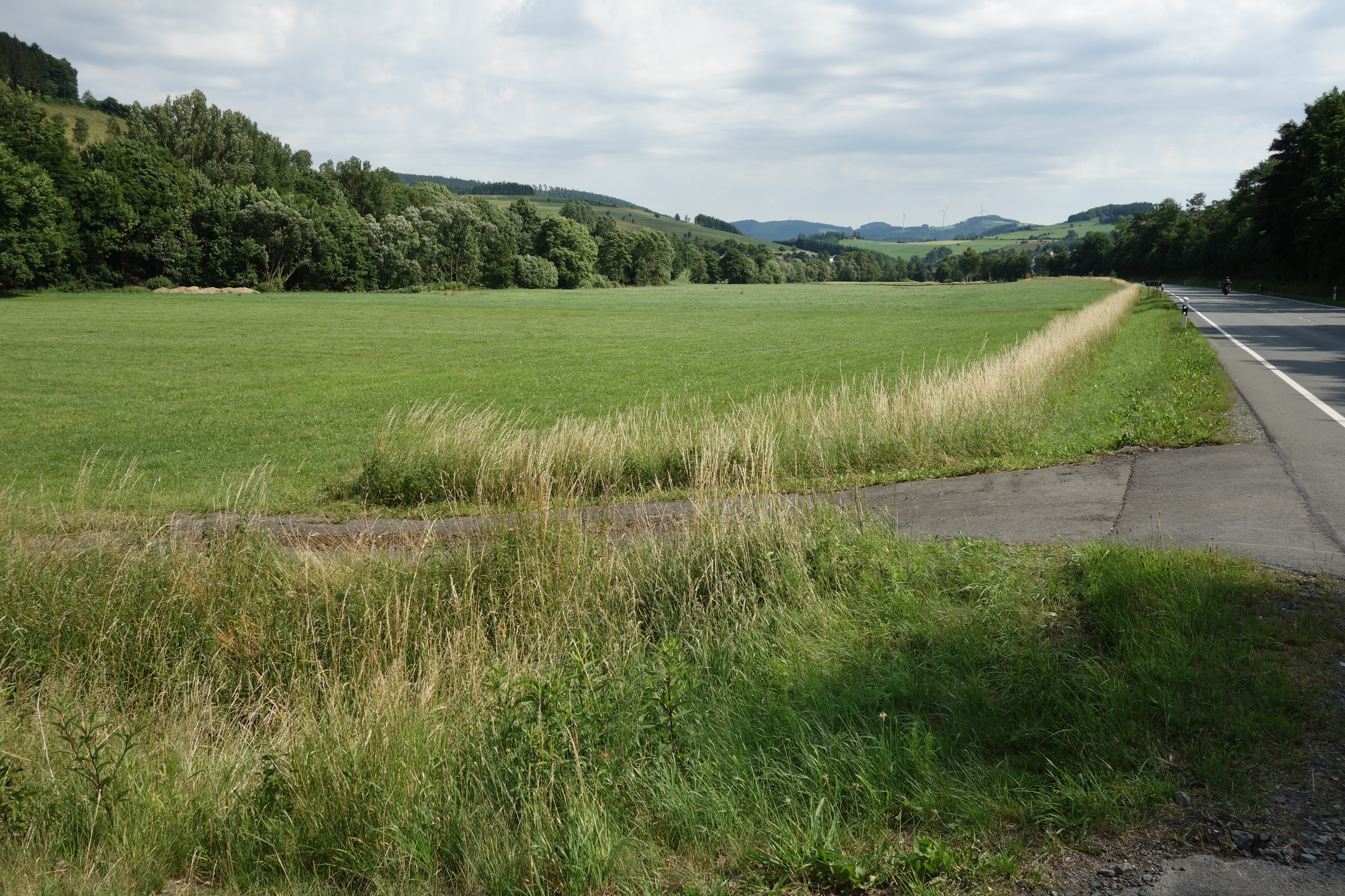 Grünland gehört zum Landschaftsschutzgebiet Brabecke und Gellinghauser Bach mit Seitentälern von nördlich Brabecke bis Osterwald und südlich Bödefeld, hier nördlich Gellinghausen. Berge im Hintergrund gehören zum Landschaftsschutzgebiet Schmallenberg Südost.